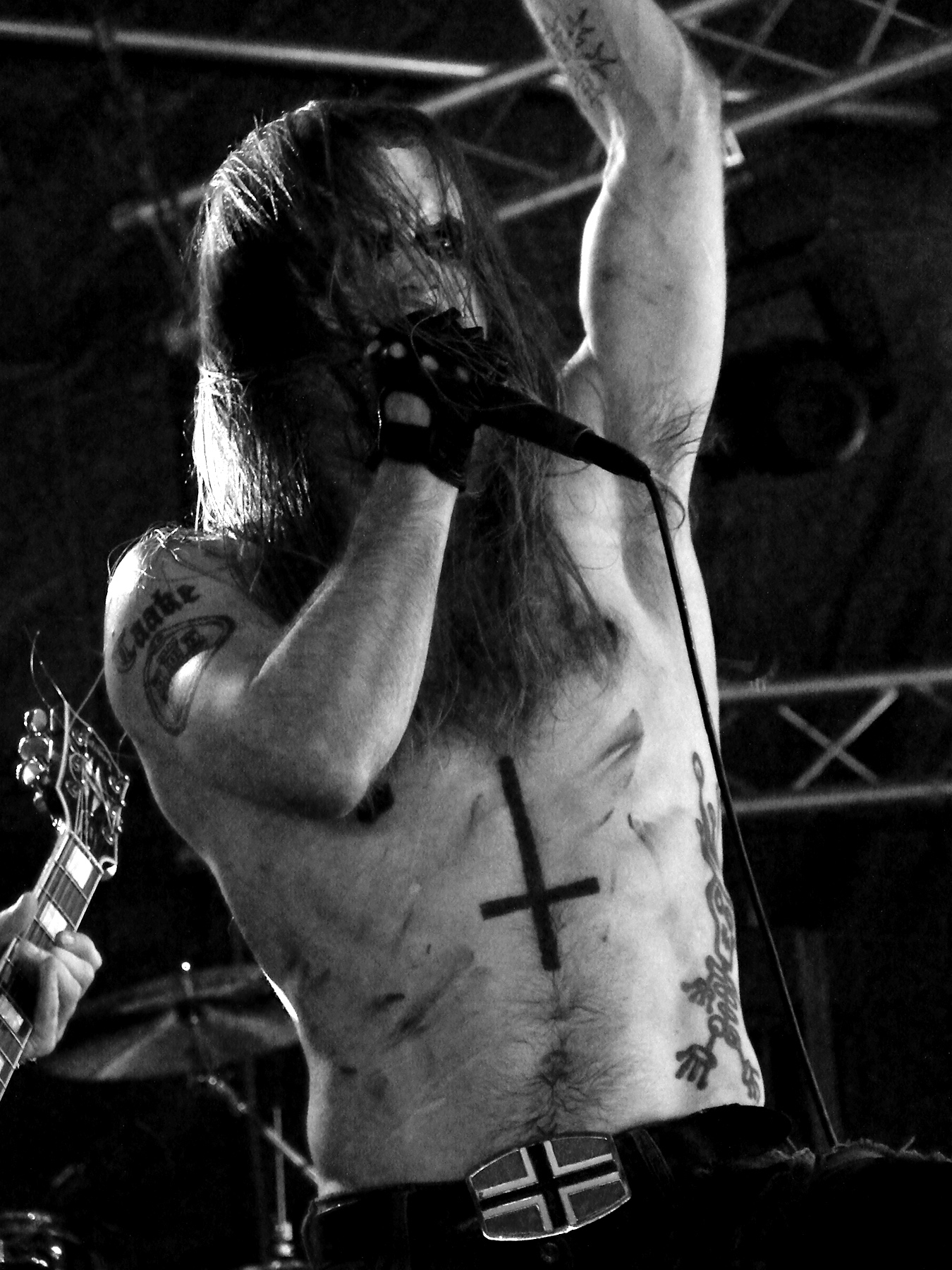 Taake au Hellfest 2009:Hoest.